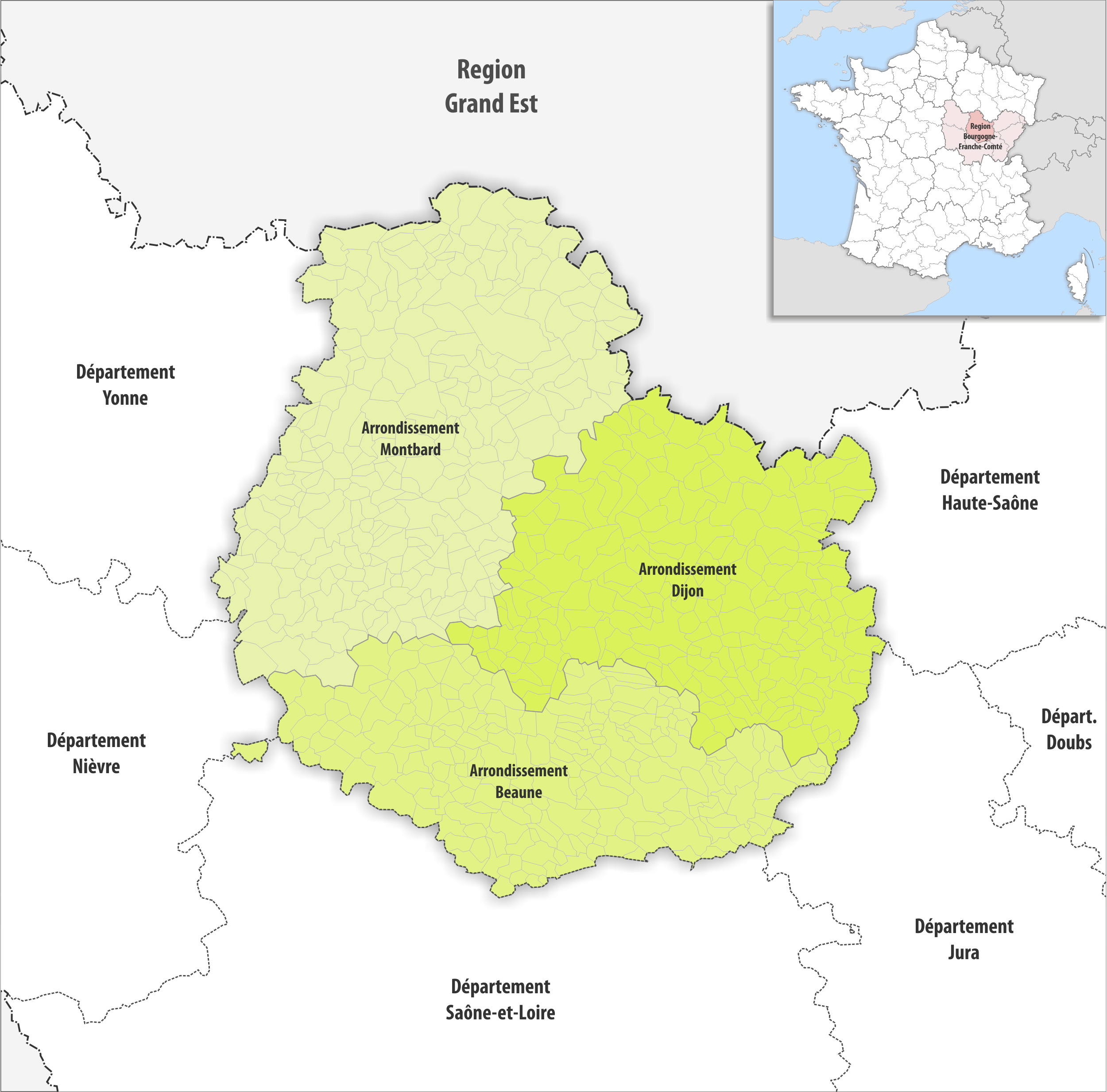 Gemeinden und Arrondissemente im Departement Côte-d’Or